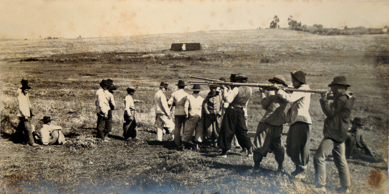 Práctica de tiro de fuerzas nacionalistas en la Revolución de 1897 en Uruguay